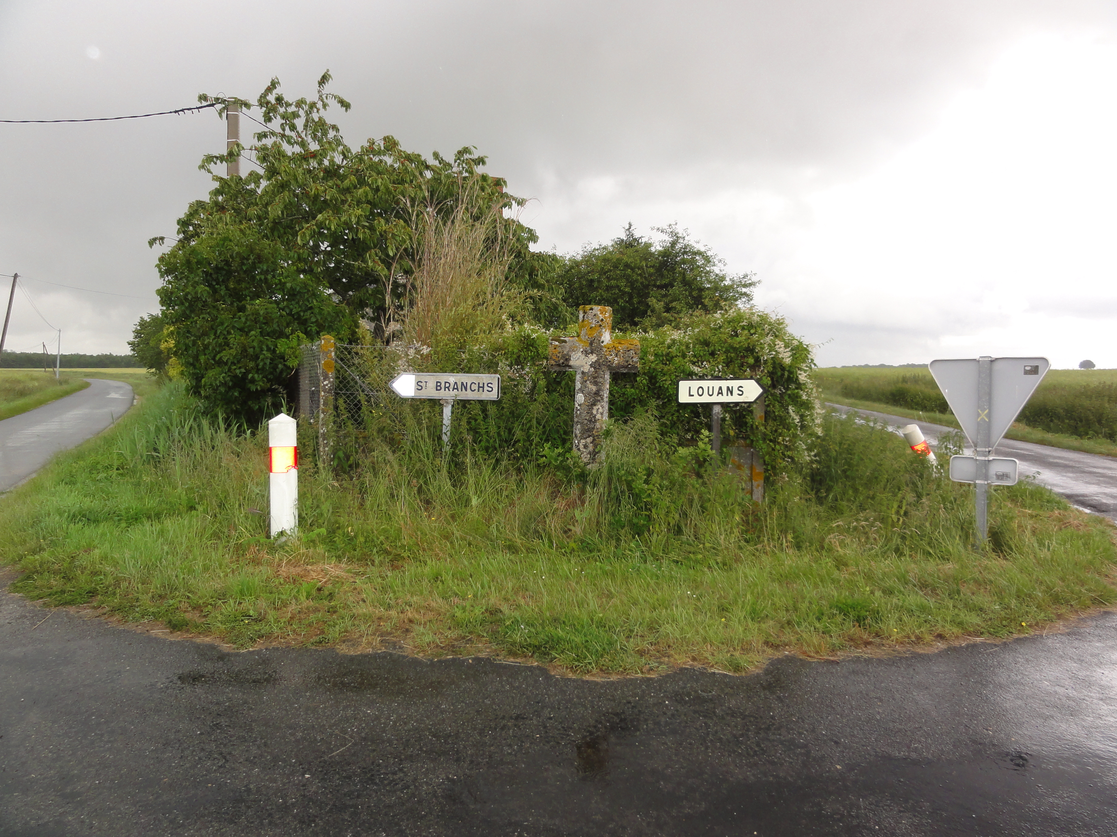 Sainte-Catherine-de-Fierbois (Indre-et-Loire) Croix de chemin